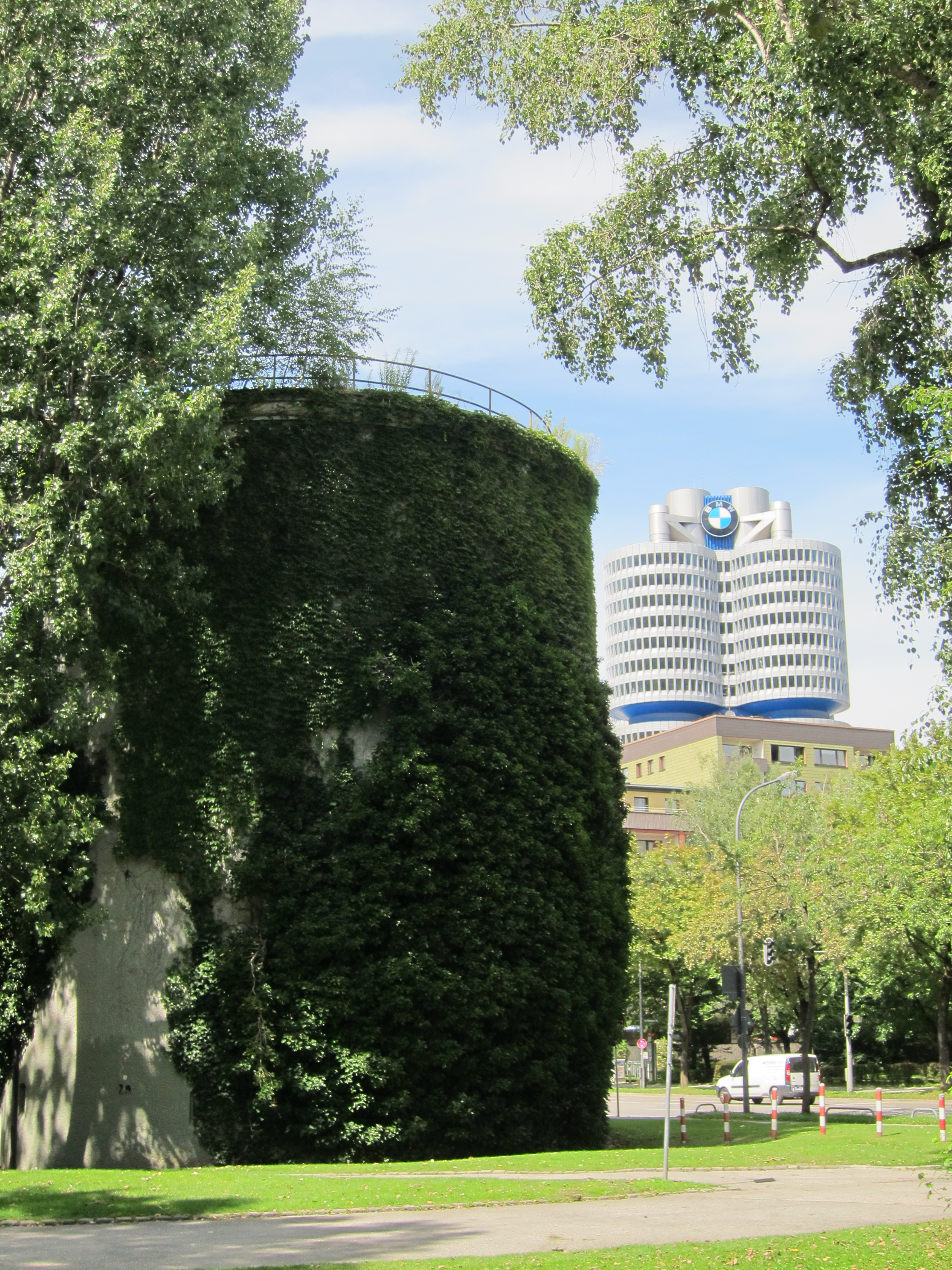 Hochbunker in München-Milbertshofen, Lerchenauer Str. 53, am Olympiapark; im Hintergrund der "Vierzylinder", das BMW-Hauptverwaltungsgebäude